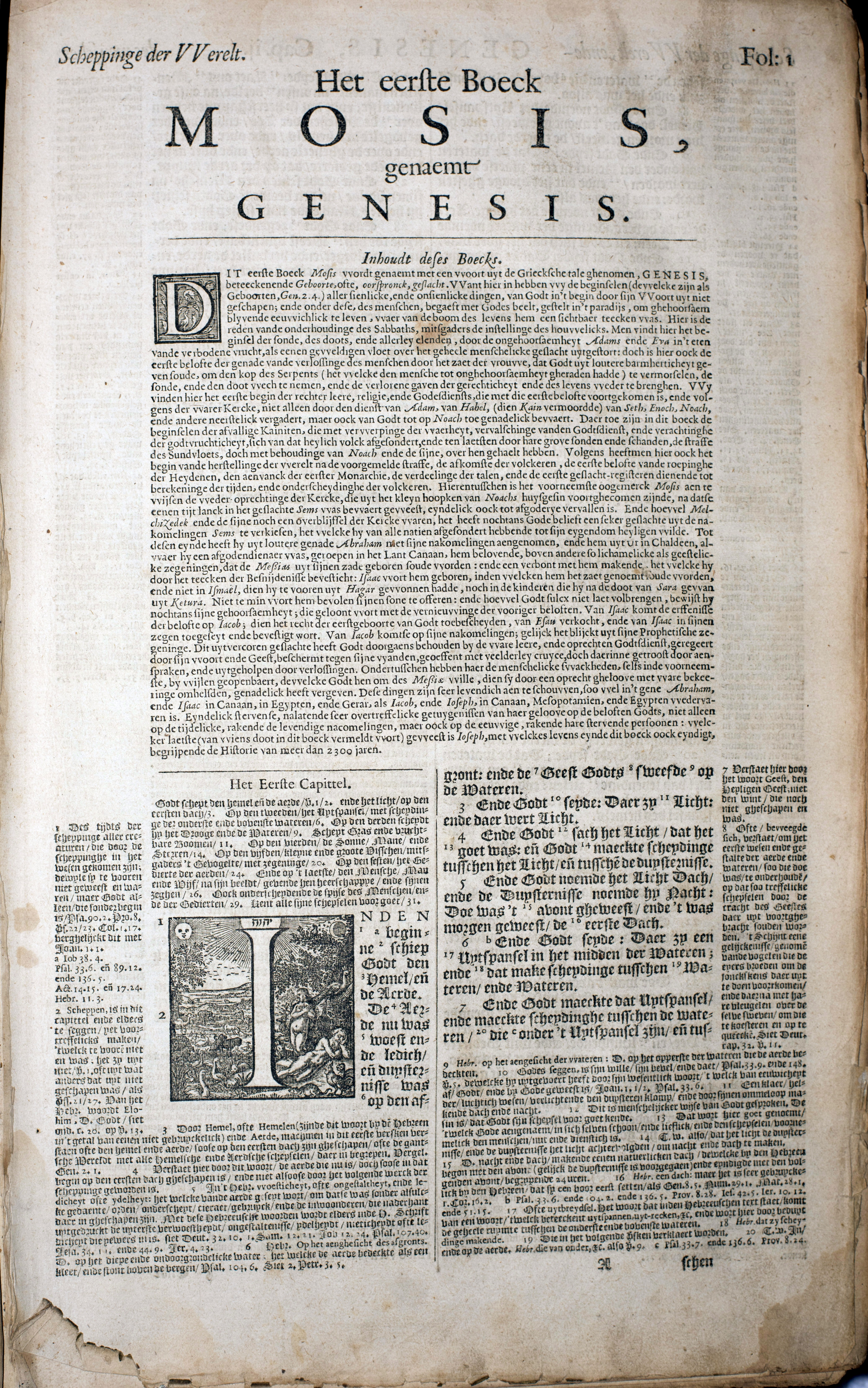 Uit een Statenbijbel: eerste blad van "Het eerste Boeck MOSIS genaemt GENESIS." ("Scheppinge der Werelt")